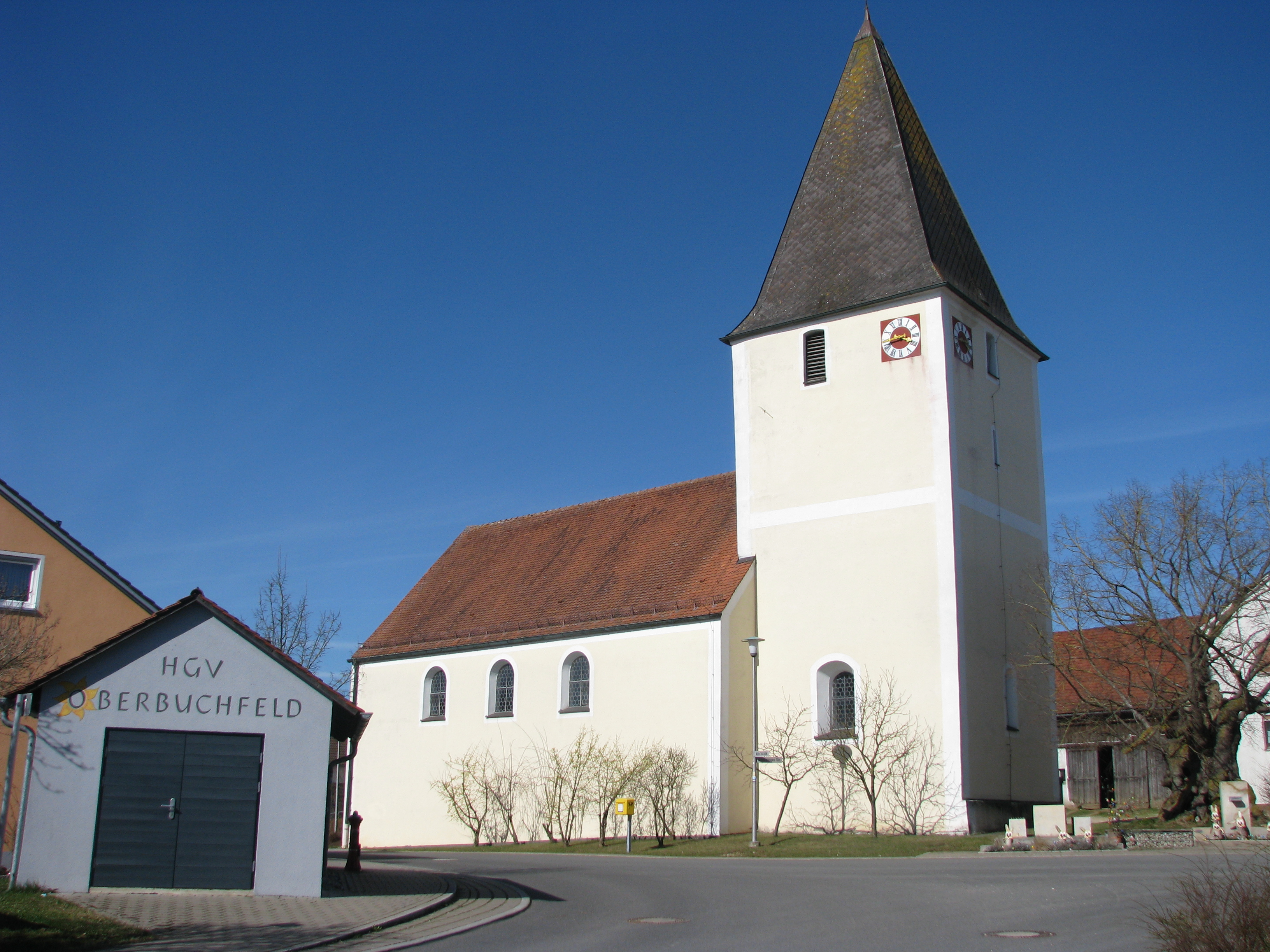 Oberbuchfeld, Ortsteil von Deining im Landkreis Neumarkt in der Oberpfalz, Bayern, Kath. Kirche St. Jakobus der Ältere